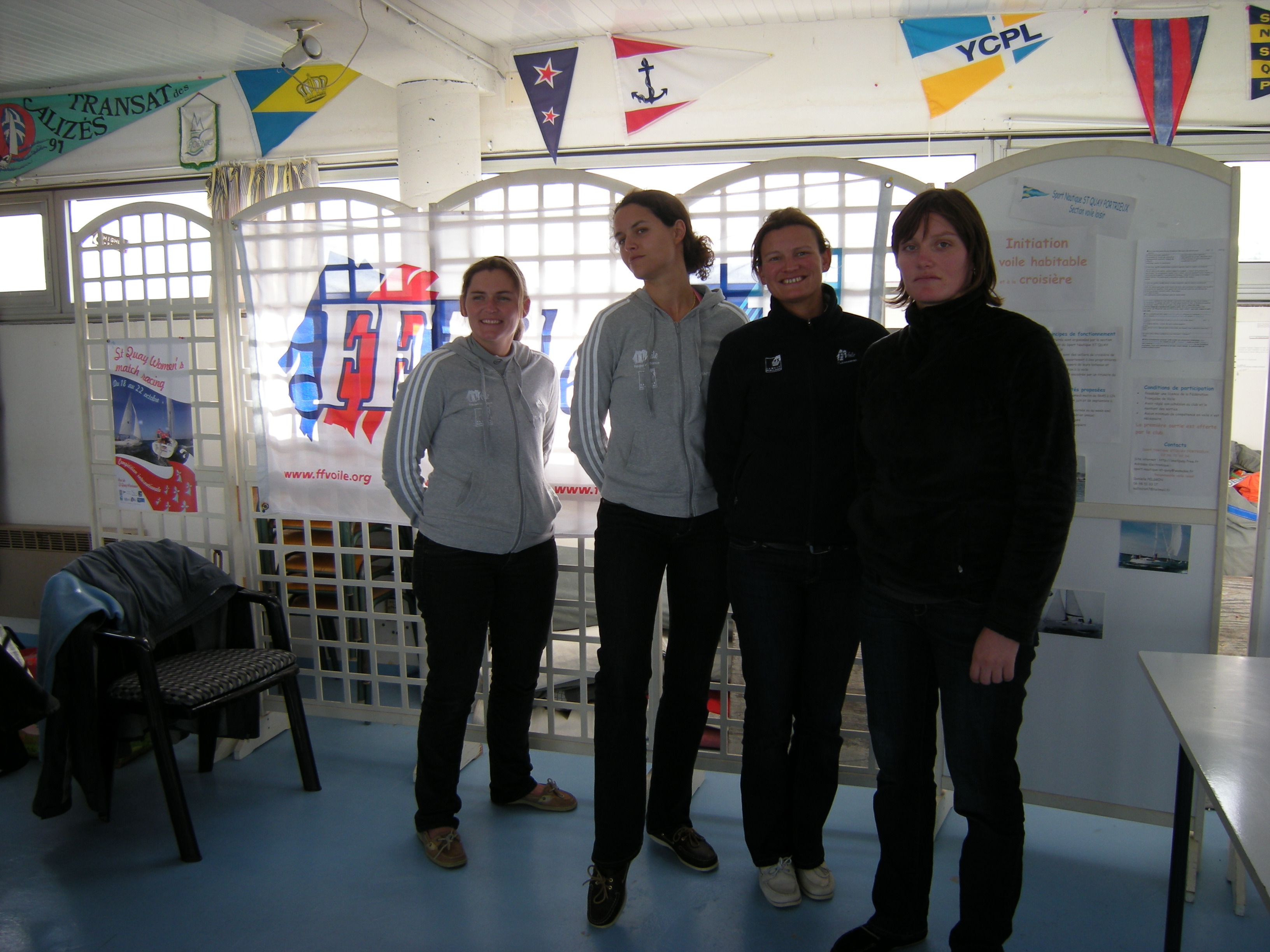 L'équipage de Match racing de Claire Leroy 2011, en vue des JO 2012. De gauche à droite : Claire Leroy, Elodie Bertrand, Claire Pruvot et Marie Riou (quatre pour un équipage de trois en régate)